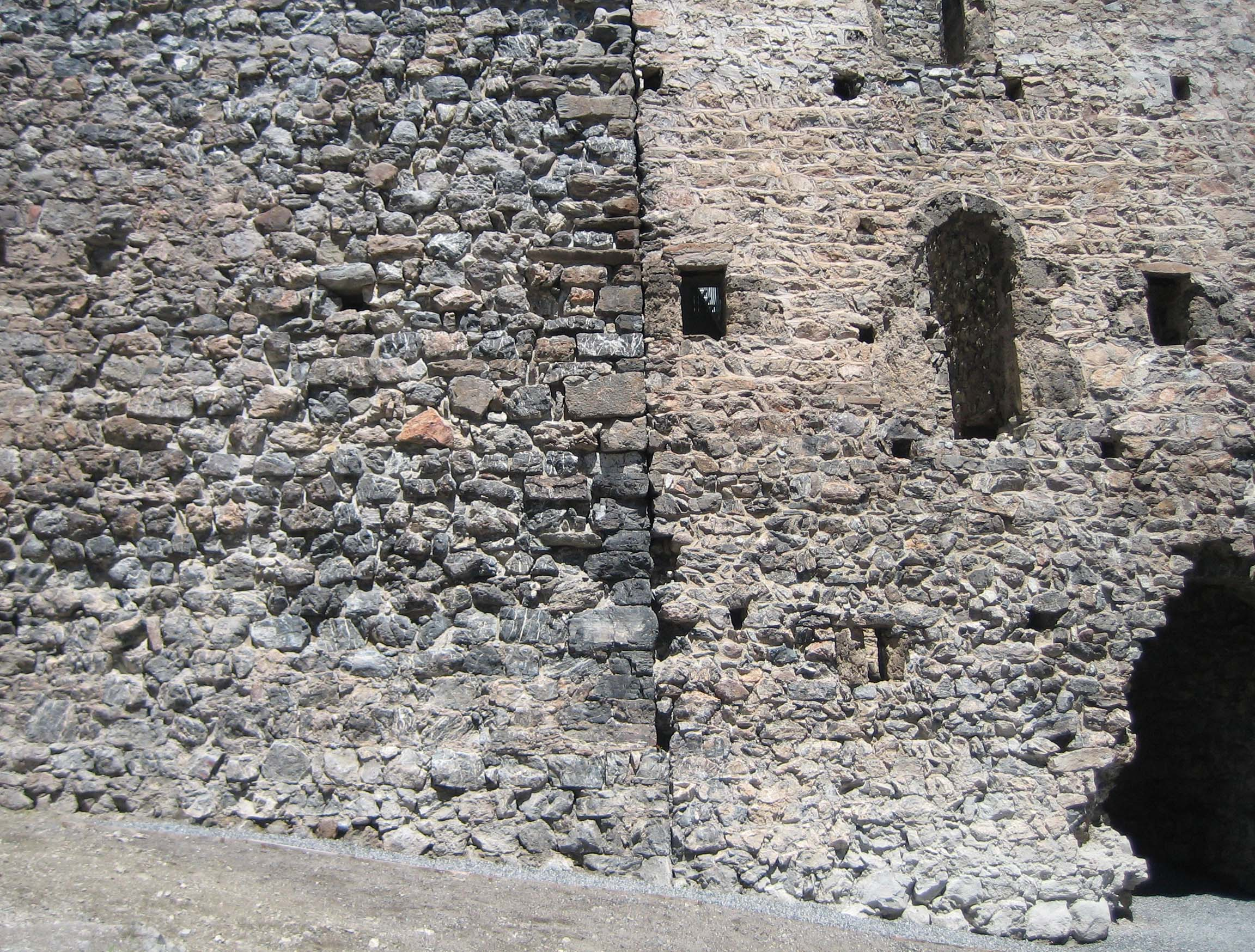 Basis der Türme